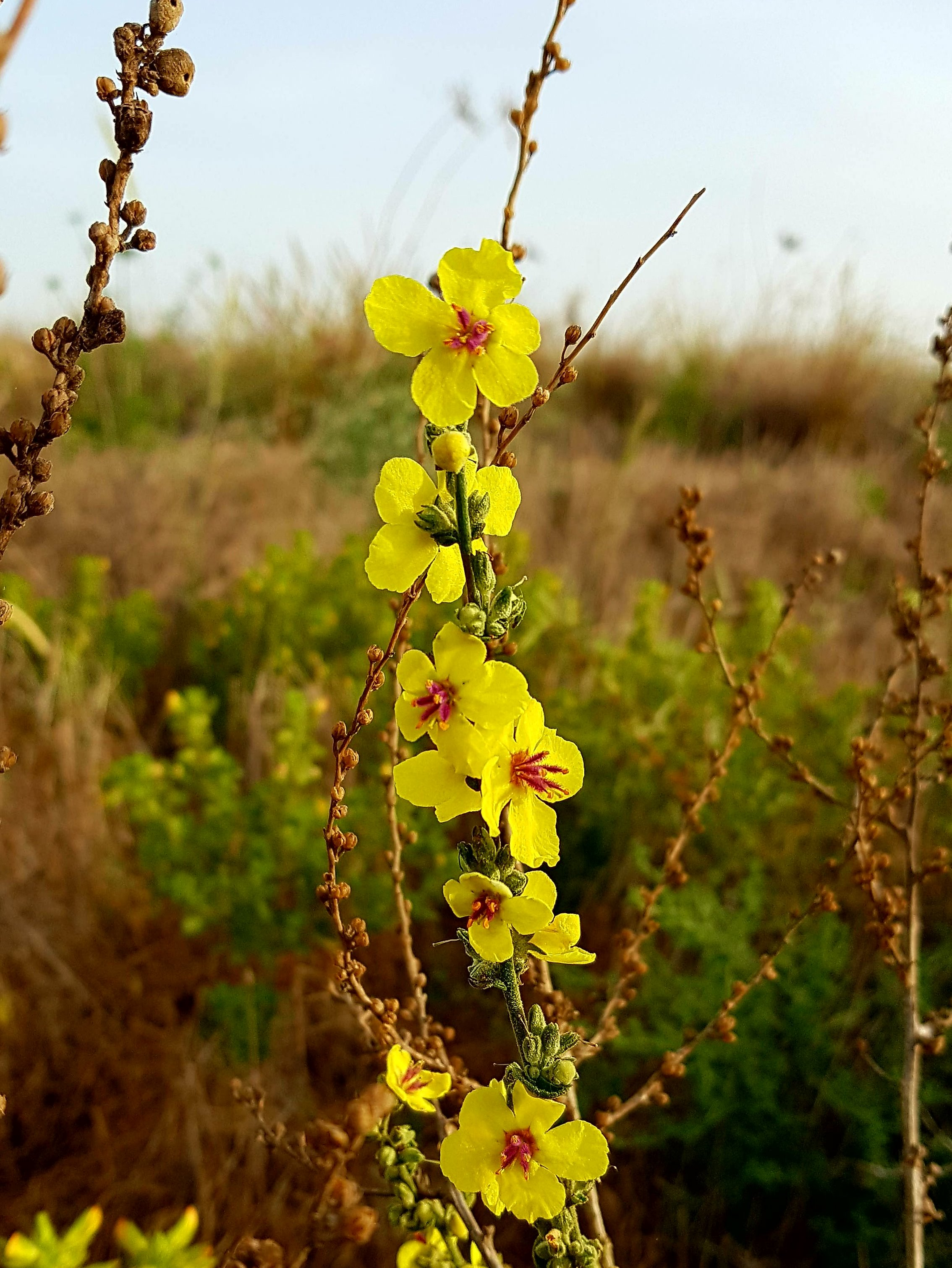 בוצין מפורץ